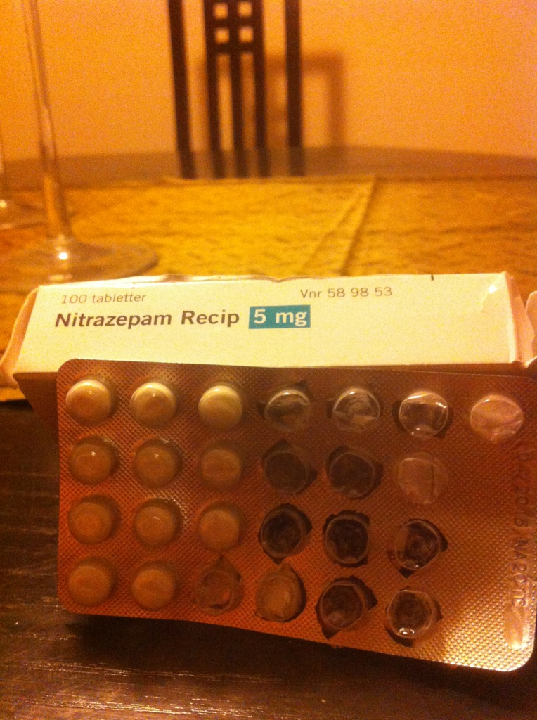 Nitrazepam 5mg